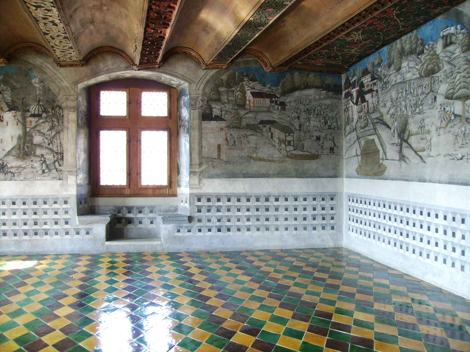 Das Kloster St. Georgen war eine Benediktinerabtei in Stein am Rhein im Kanton Schaffhausen, Schweiz. Schutzpatrone des Klosters waren St. Georg und St. Cyrill. Es handelt sich um eine der am besten erhaltenen mittelalterlichen Klosteranlagen der Schweiz.